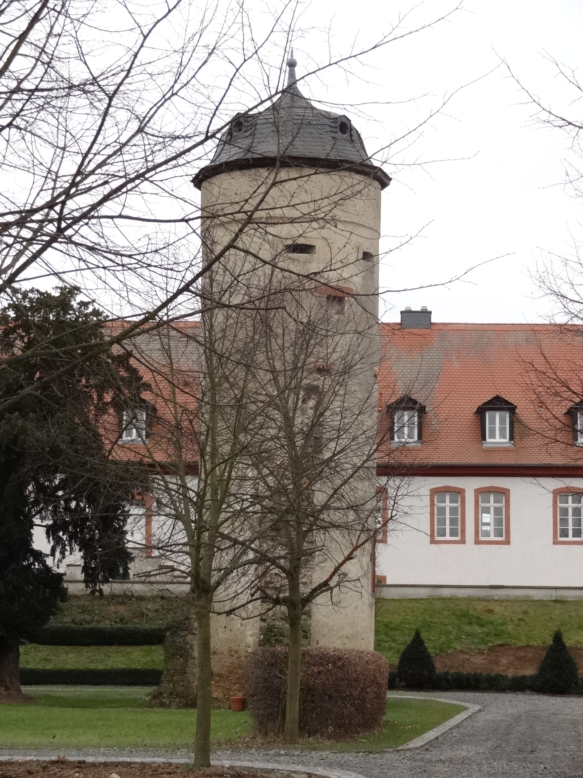 Ehemalige Wasserburg Ockstadt